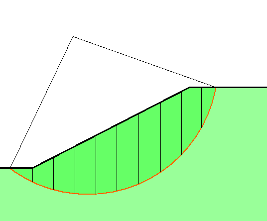 Gleitkreis-Bruchkörper beim Gleitkreisverfahren (Böschungsbruch)